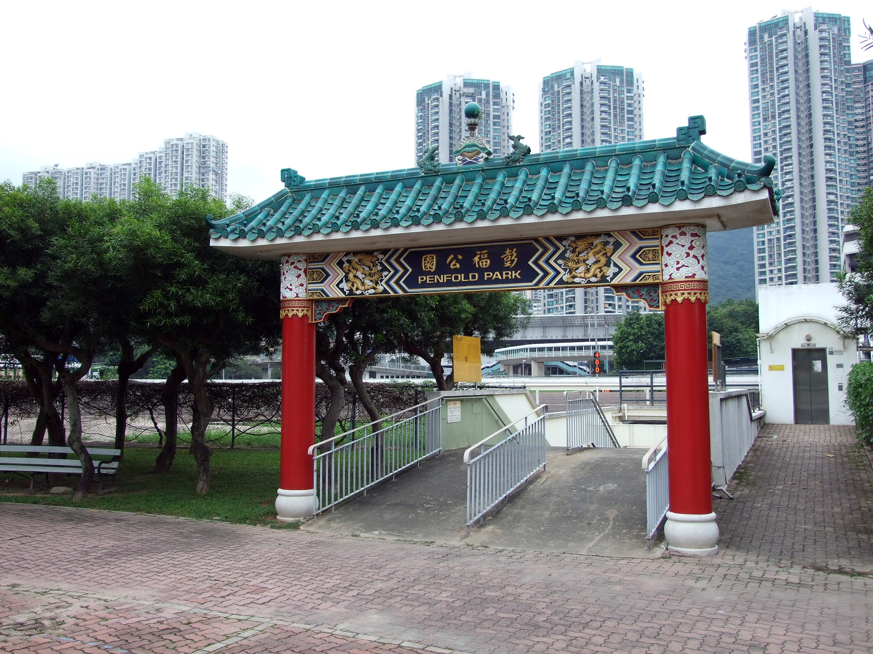 中文（香港）: 彭福公園入口牌坊